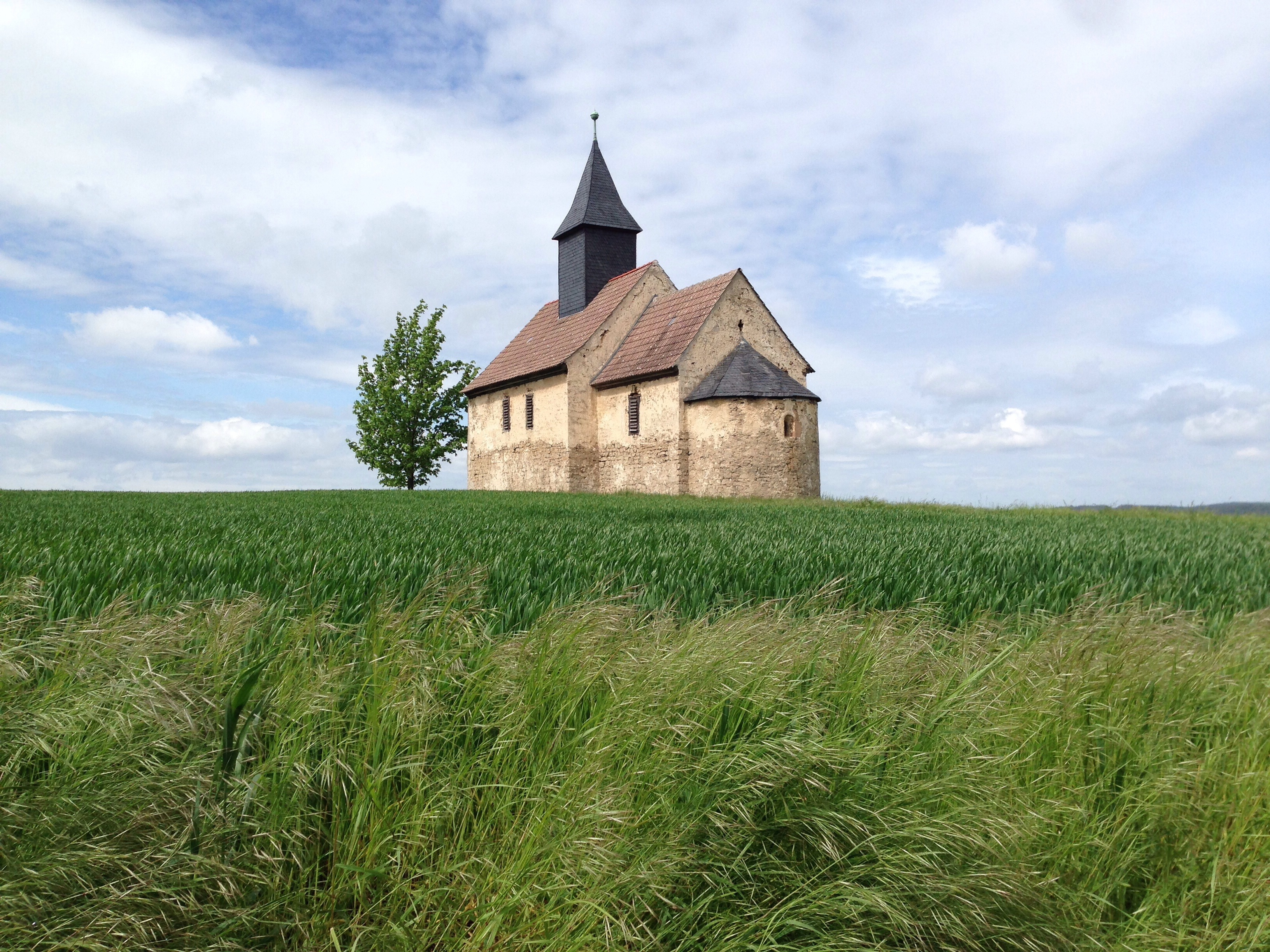 St.-Anna-Kapelle in Krobitz